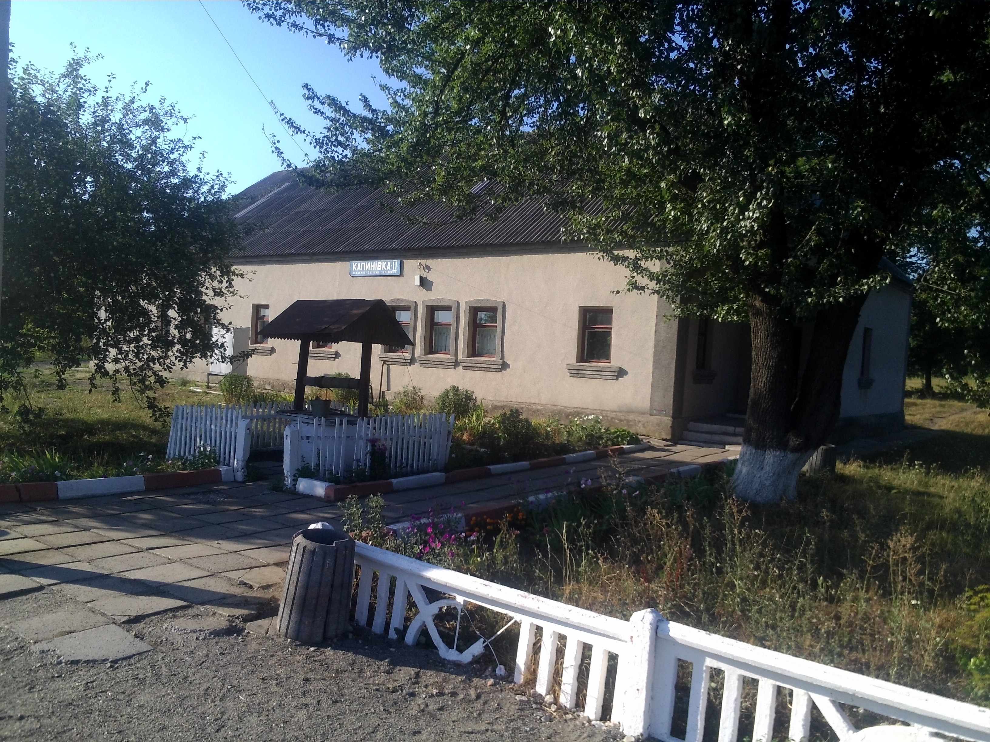 ст. Калинівка-2